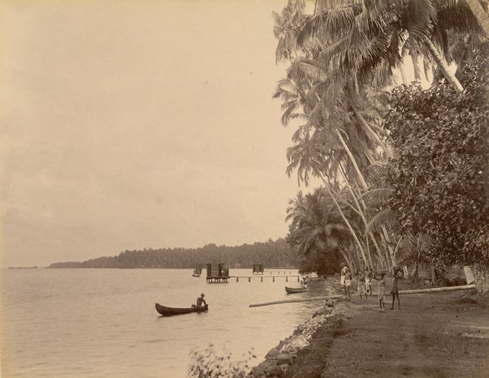 ബോള്‍ഗാട്ടിയിലെ കായല്‍: സ്രോതസ്സ് ബ്രിട്ടീഷ് ലൈബ്രറി. സക്കറിയാസ് ഡിക്രൂസ് ഉദ്ദേശം 1900-ല്‍ എടുത്ത ഫോട്ടോ